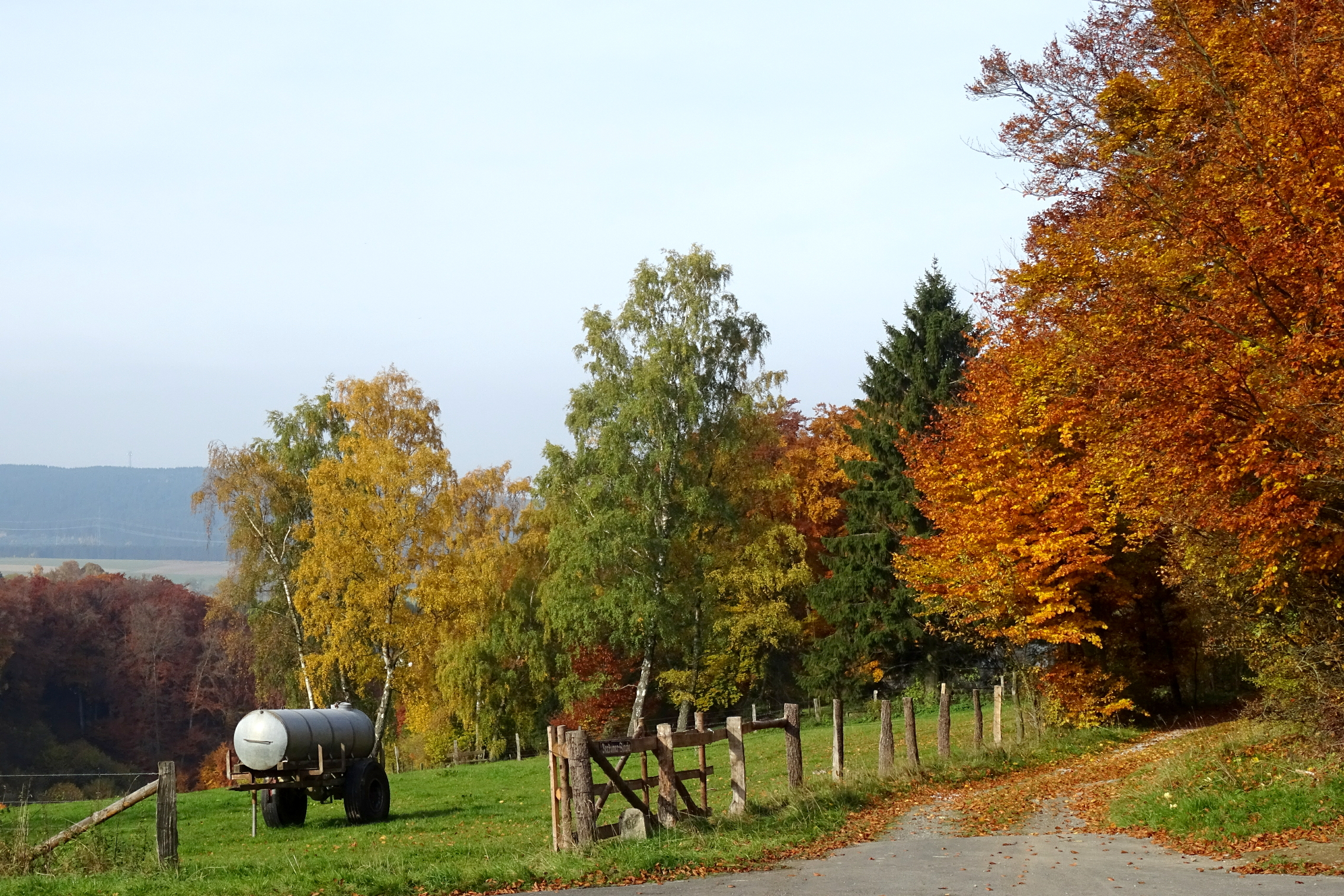 Weidefläche im Landschaftsschutzgebiet „Hoppecke-Diemel-Bergland“ (LSG 4518-0019) in Brilon